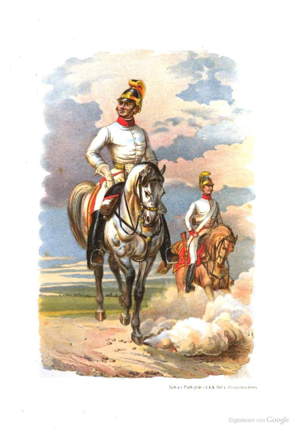 K.u.K. Achtes Ulanen Regiment um 1800